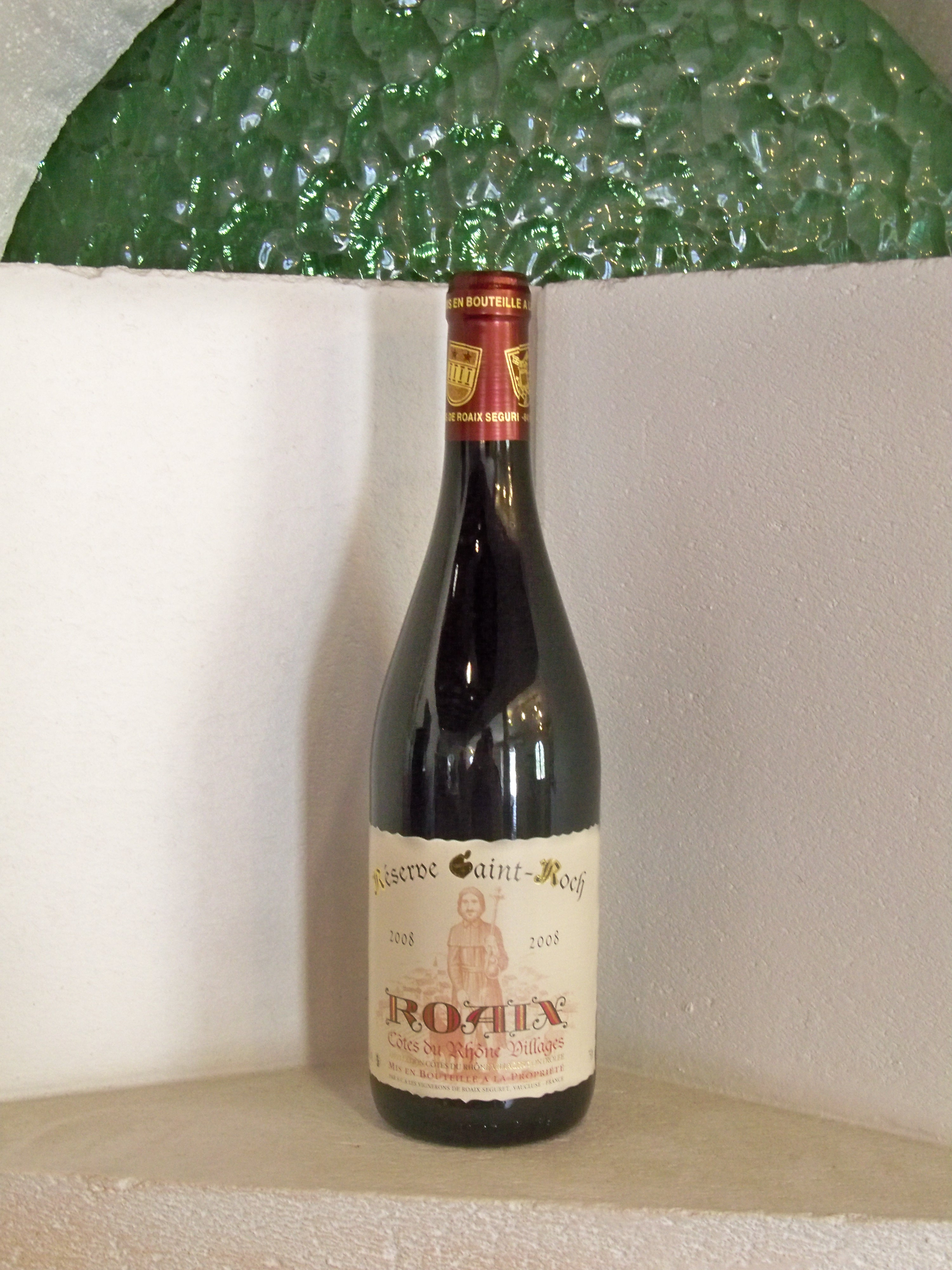 Bouteille de Roaix AOC, Réserve Saint Roch (Vacluse)